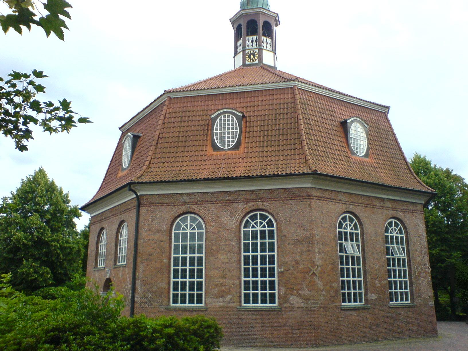 Bildbeschreibung: Kirche Niendorf Fotograf/Zeichner: PodracerHH 20:19, 28. Jun 2006 (CEST) Datum: 062006 Sonstiges: This is a photograph of an architectural monument.